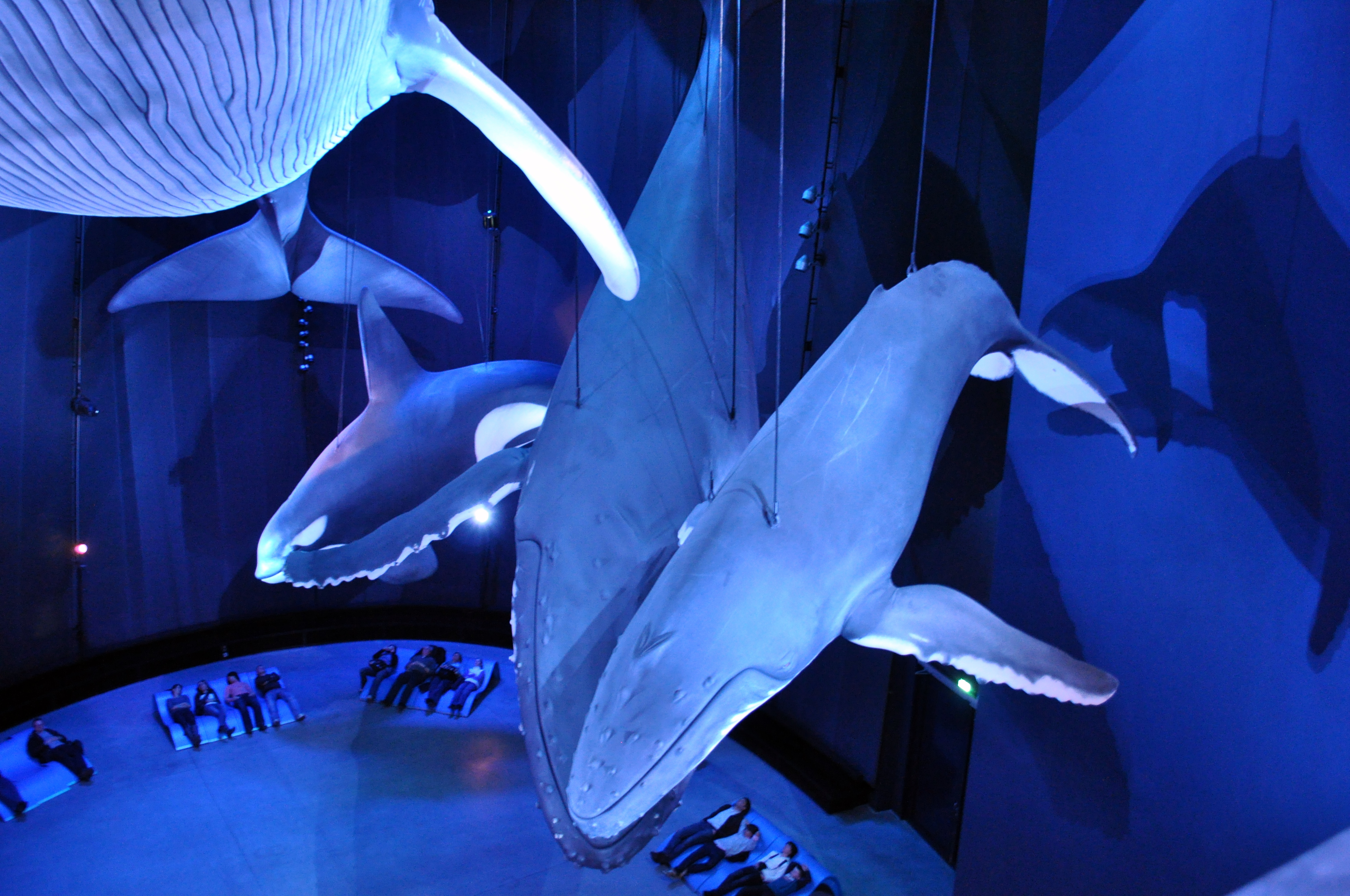 Im Ozeaneum Stralsund, in der Ausstellungshalle Riesen der Meere 1:1, Detail.